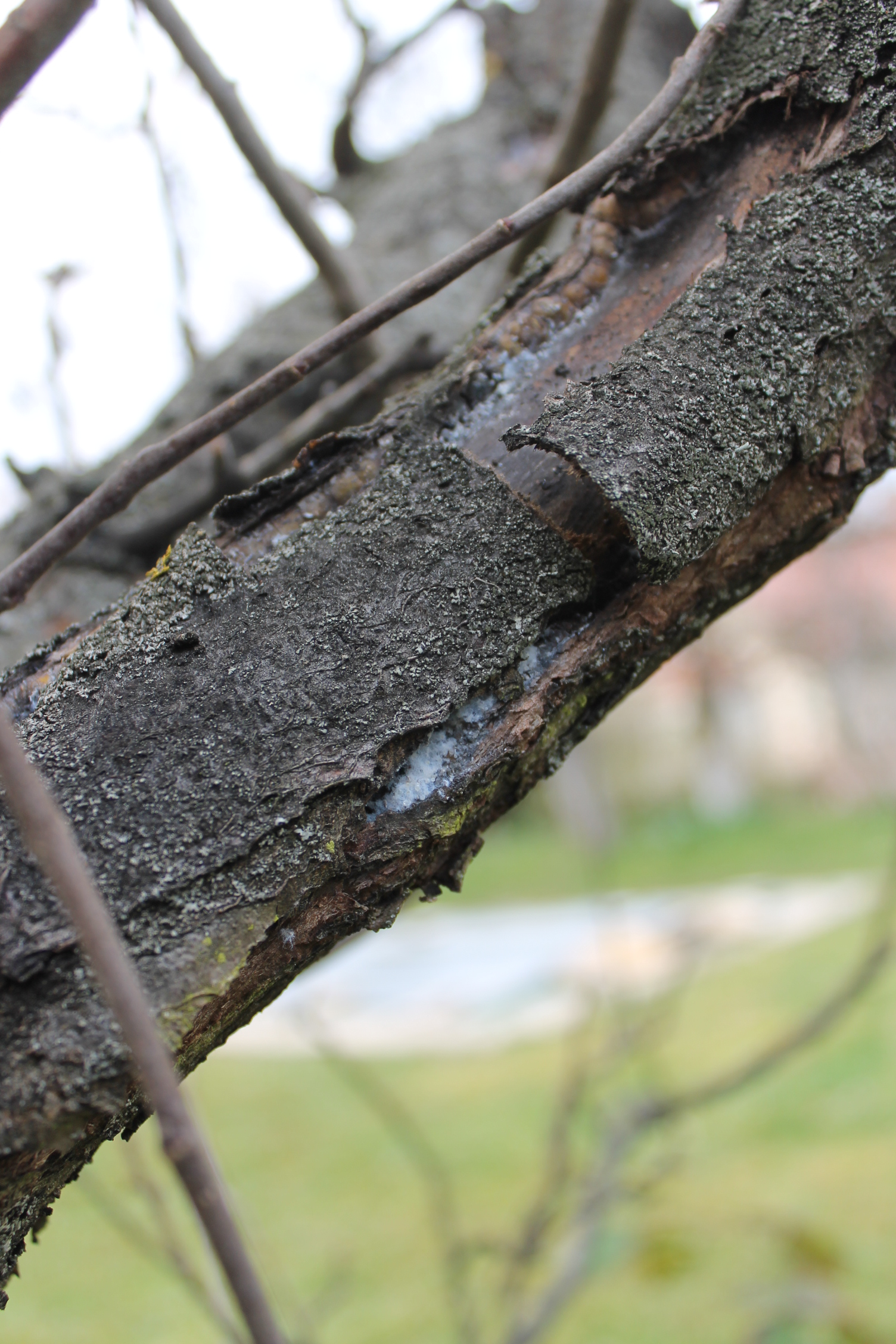 Mšice krvavá v prasklině kterou způsobila Nectria galigena